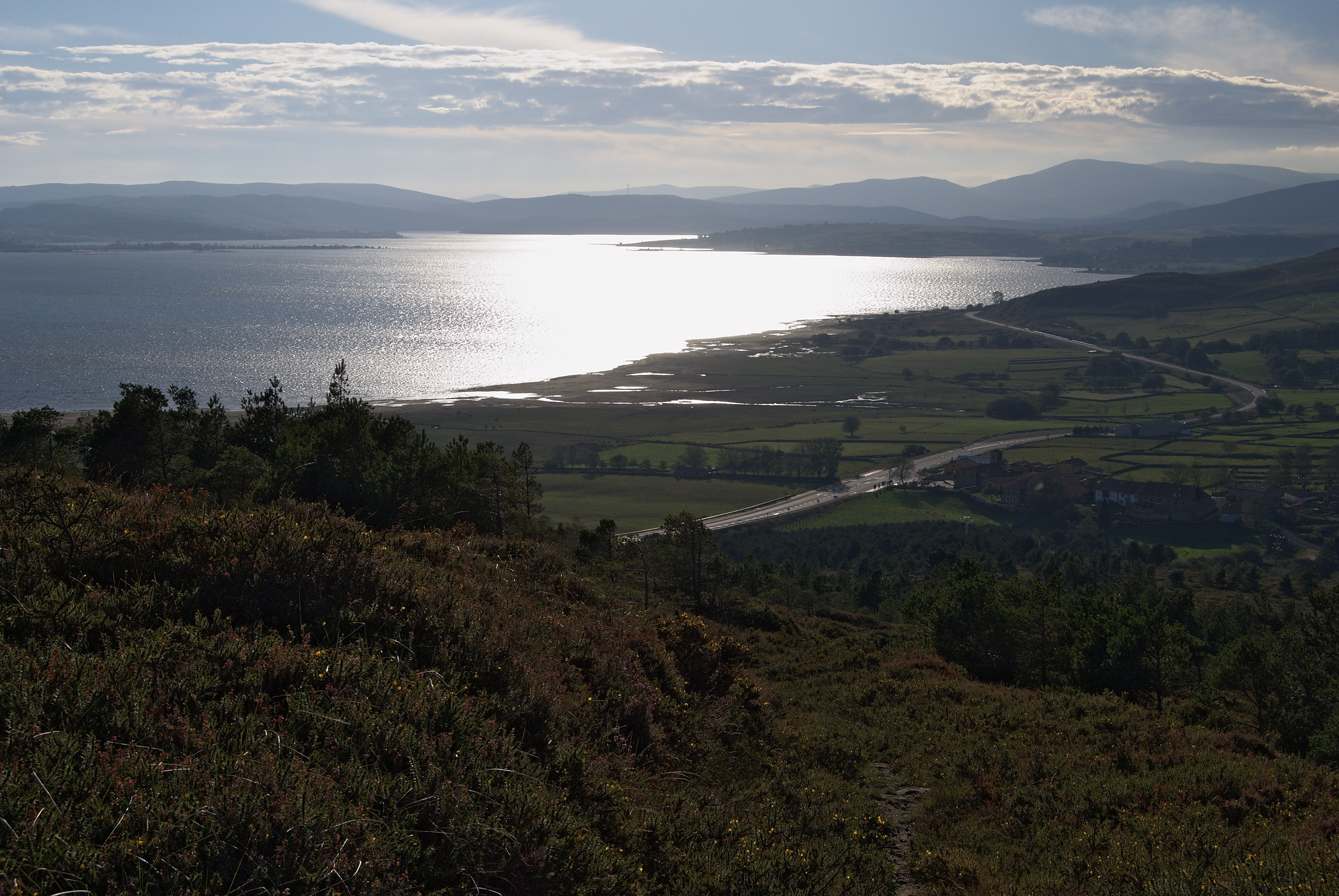 Embalse del Ebro-Monte Hijedo This is a photography of a Site of Community Importance in Spain with the ID: ES4120090. Natura2000 entry, EEA entry